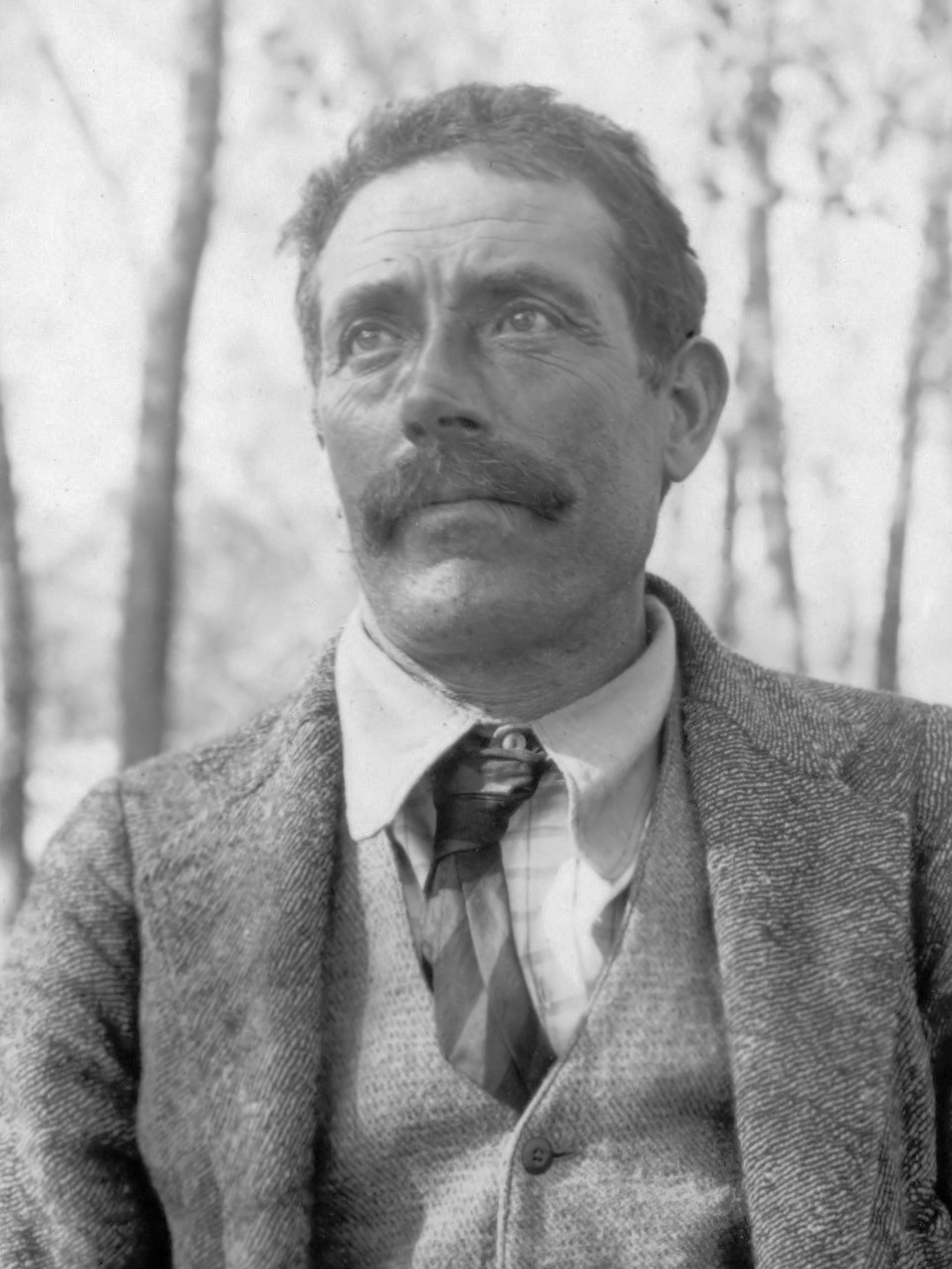 [DLC] Fotoalbum Visser: Derde Karakorumexpeditie, 1929 1929/05/28